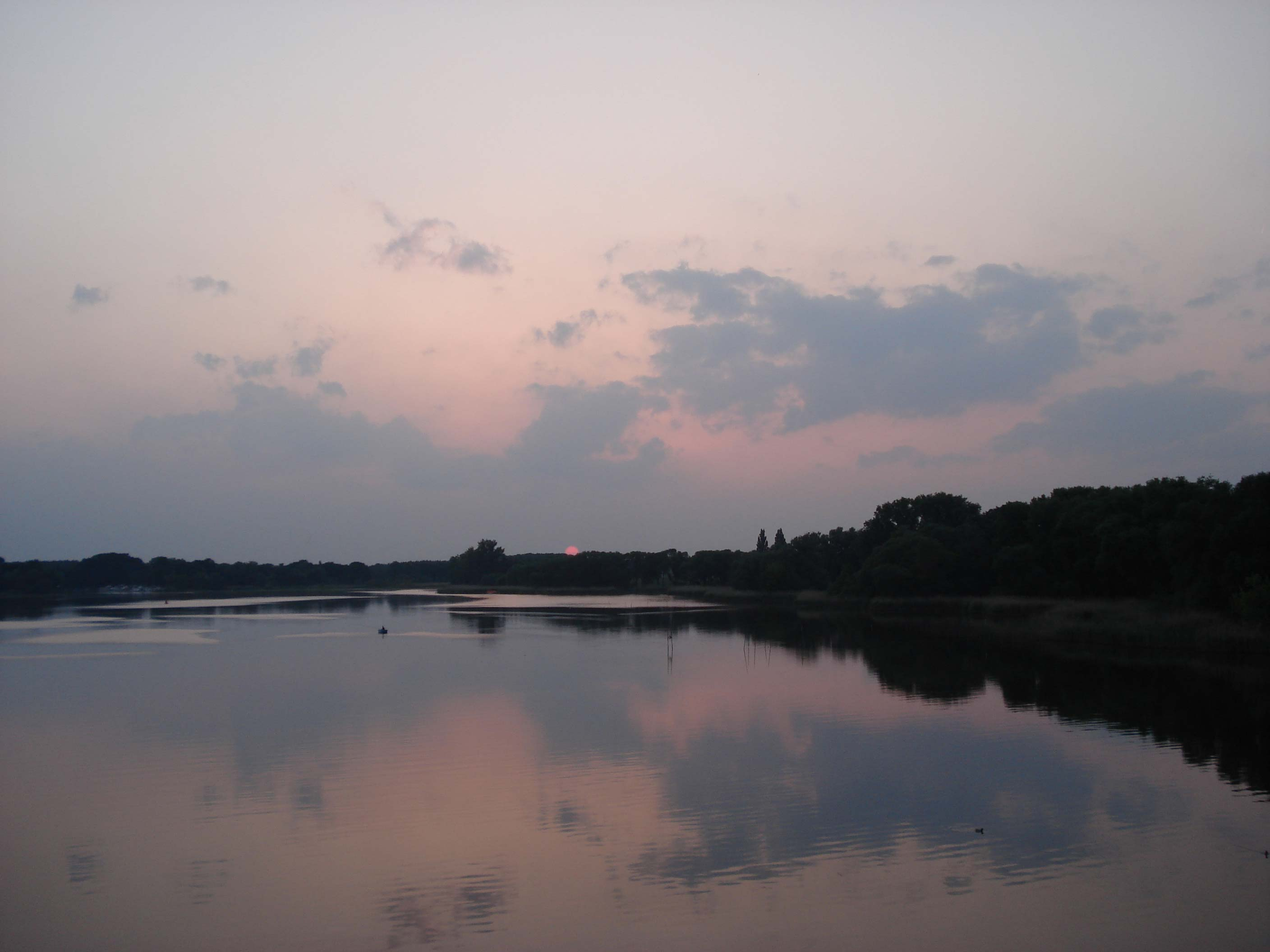 Der Wendsee nach Westen von der Seegartenbrücke aus gesehen, Sonnenuntergang am 24. Mai 2007